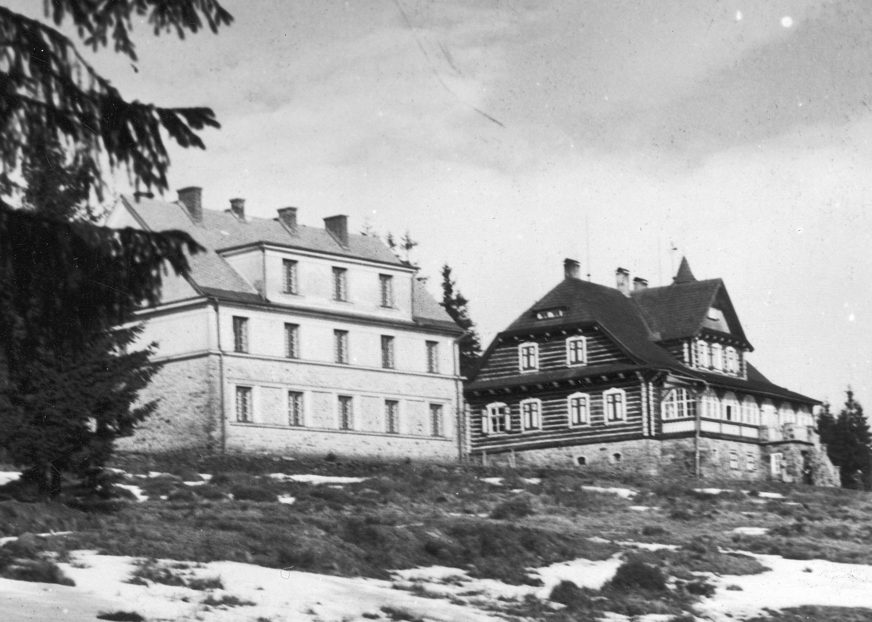 Schronisko na Wielkim Połomie oraz Kamenna chata